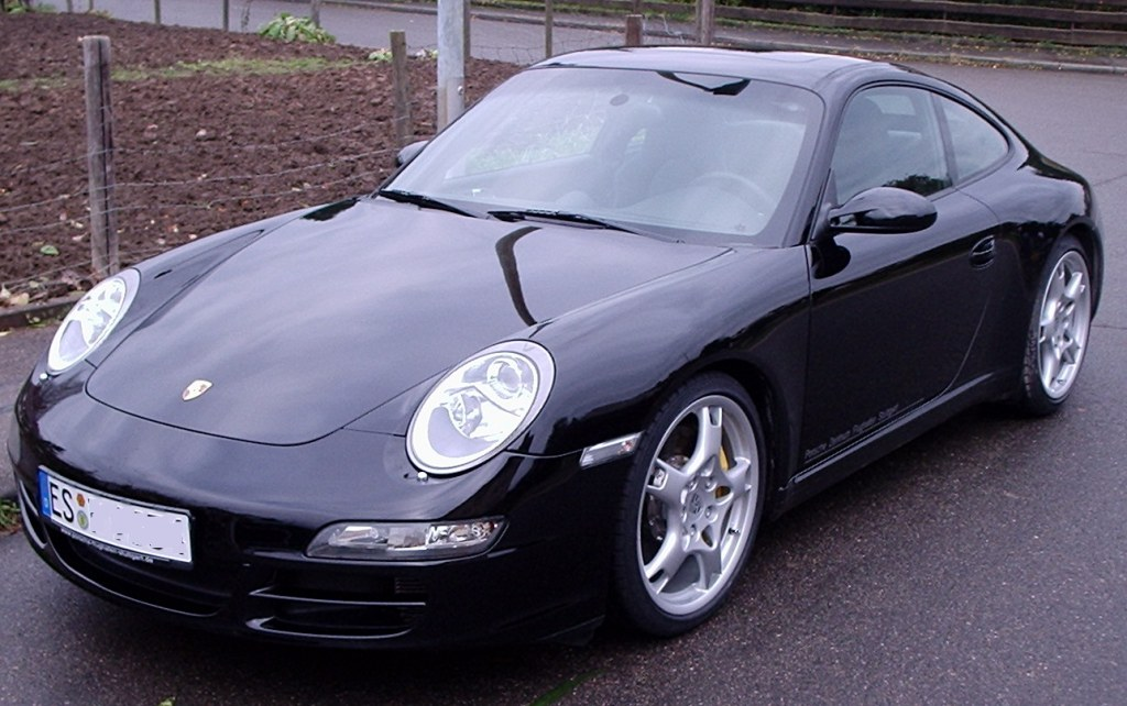 Porsche 911, Modell 997 (Carrera S).